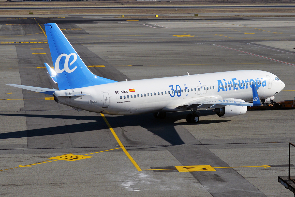 Air Europa, EC-MKL, Boeing 737-85P